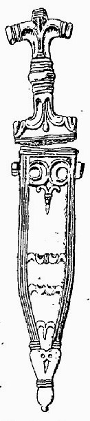 Le poignard du Faou.